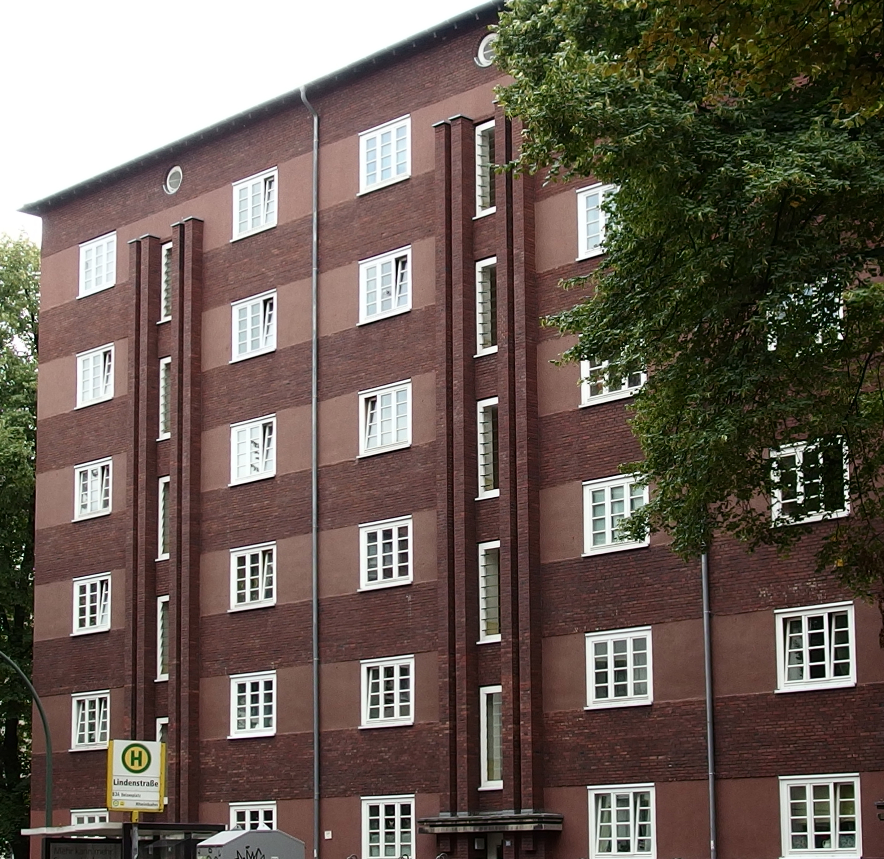 Wohnbebauung Eulerhof in Düsseldorf-Flingern, Fassadenausschnitt an der Lindenstraße